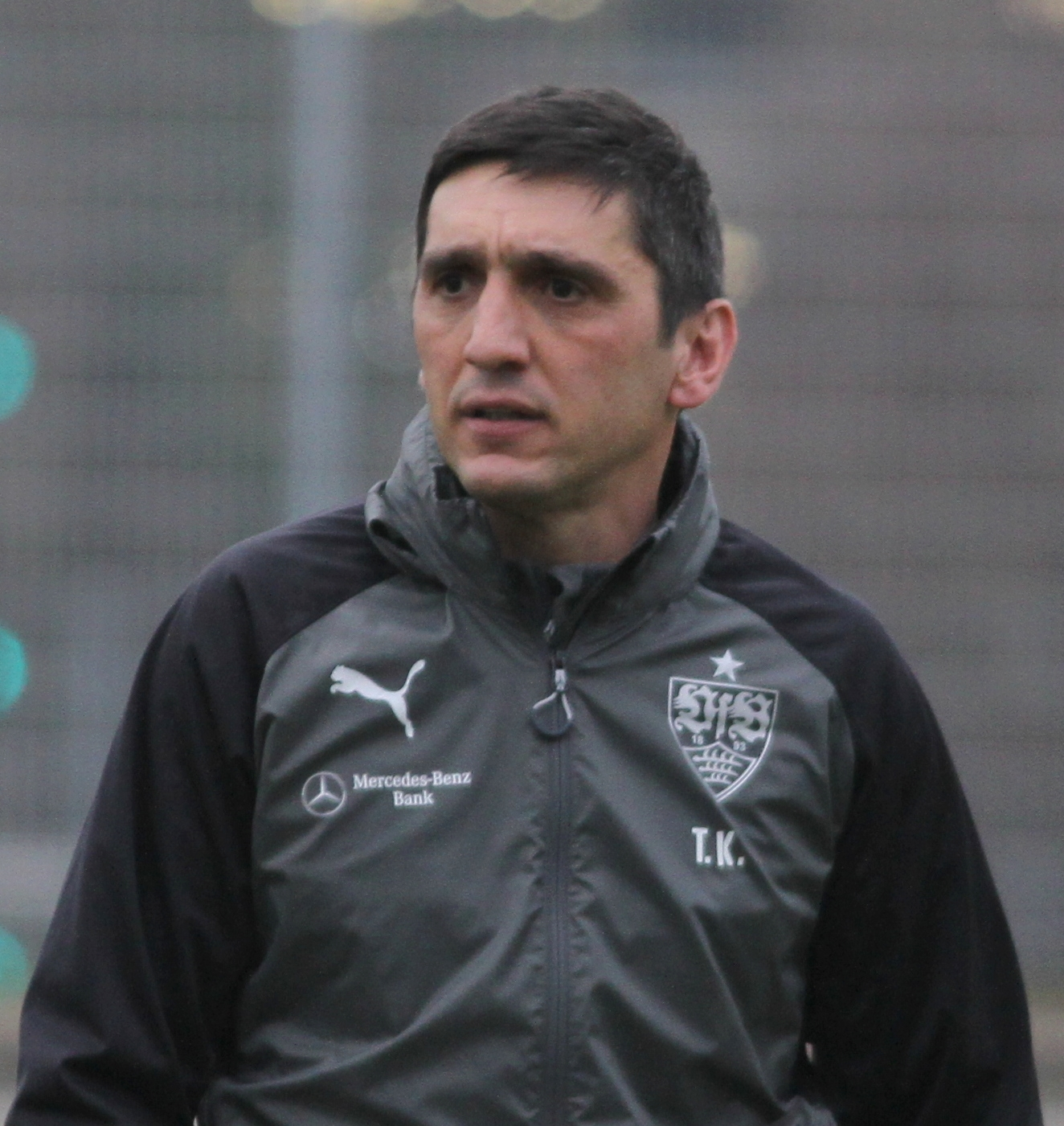 Tayfun Korkut beim ersten Training als Cheftrainer des VfB 2018. Aufgenommen von